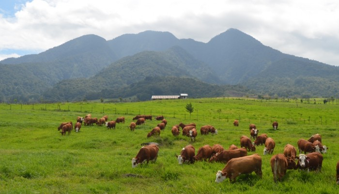 Lahan-rata-padang mangateh